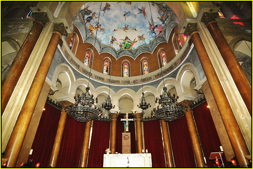 Absis de l'església de Santa Madrona (Poble Sec, Barcelona).